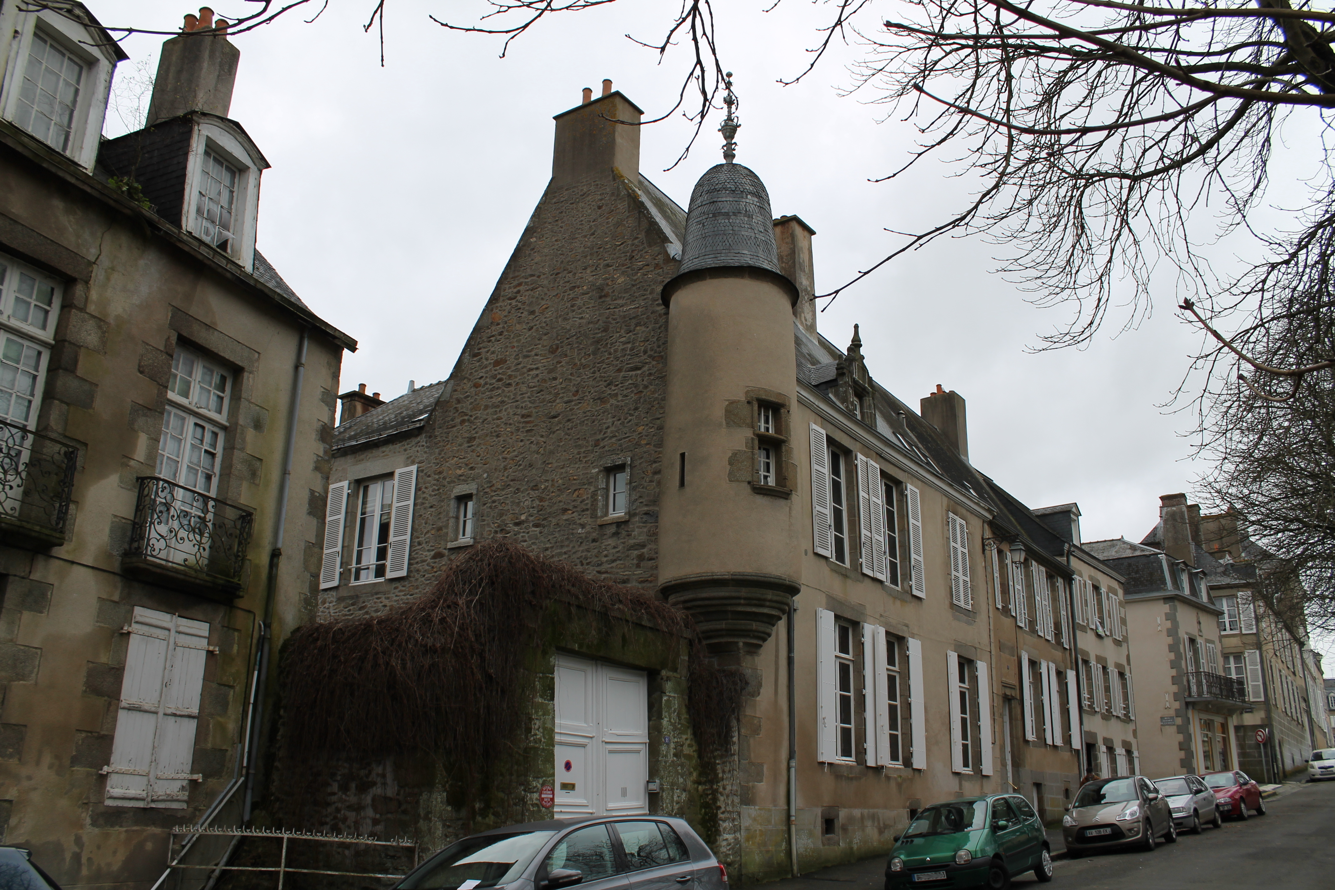 L'Hôtel Chappedelaine à Mayenne.